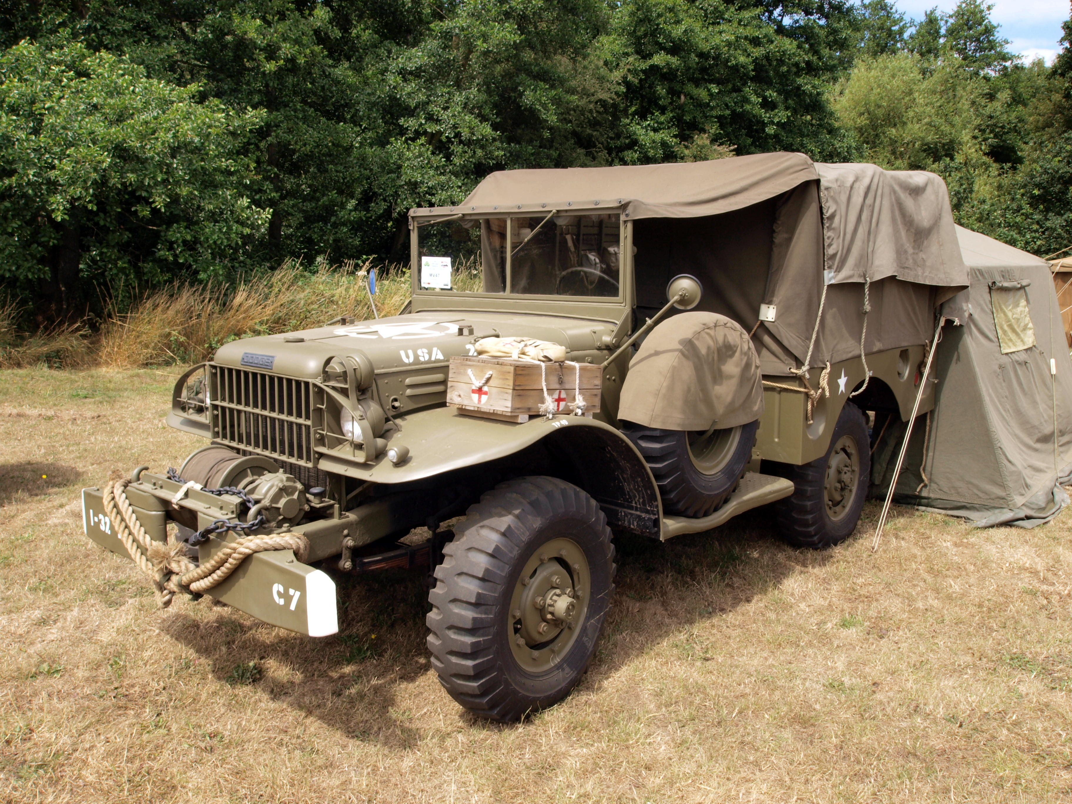 Dodge WC-52, USA 2121976